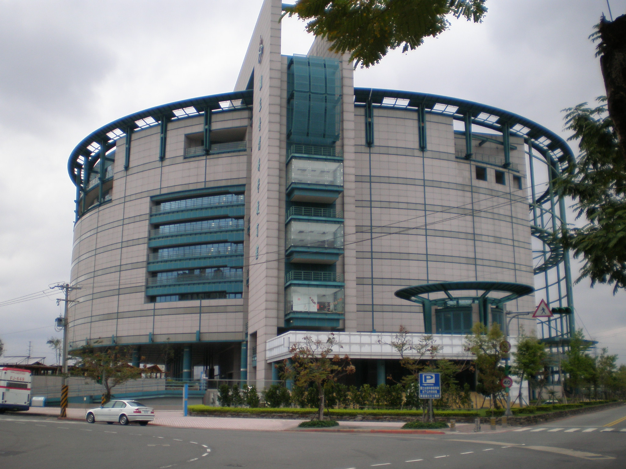 國立臺灣科學教育館，位於臺北市士林區士商路189號。